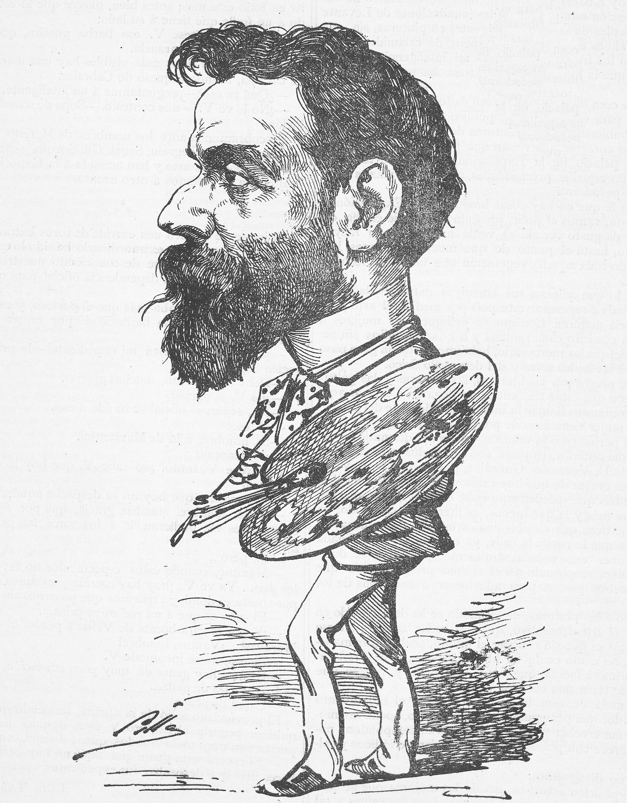 Alejandro Ferrant.